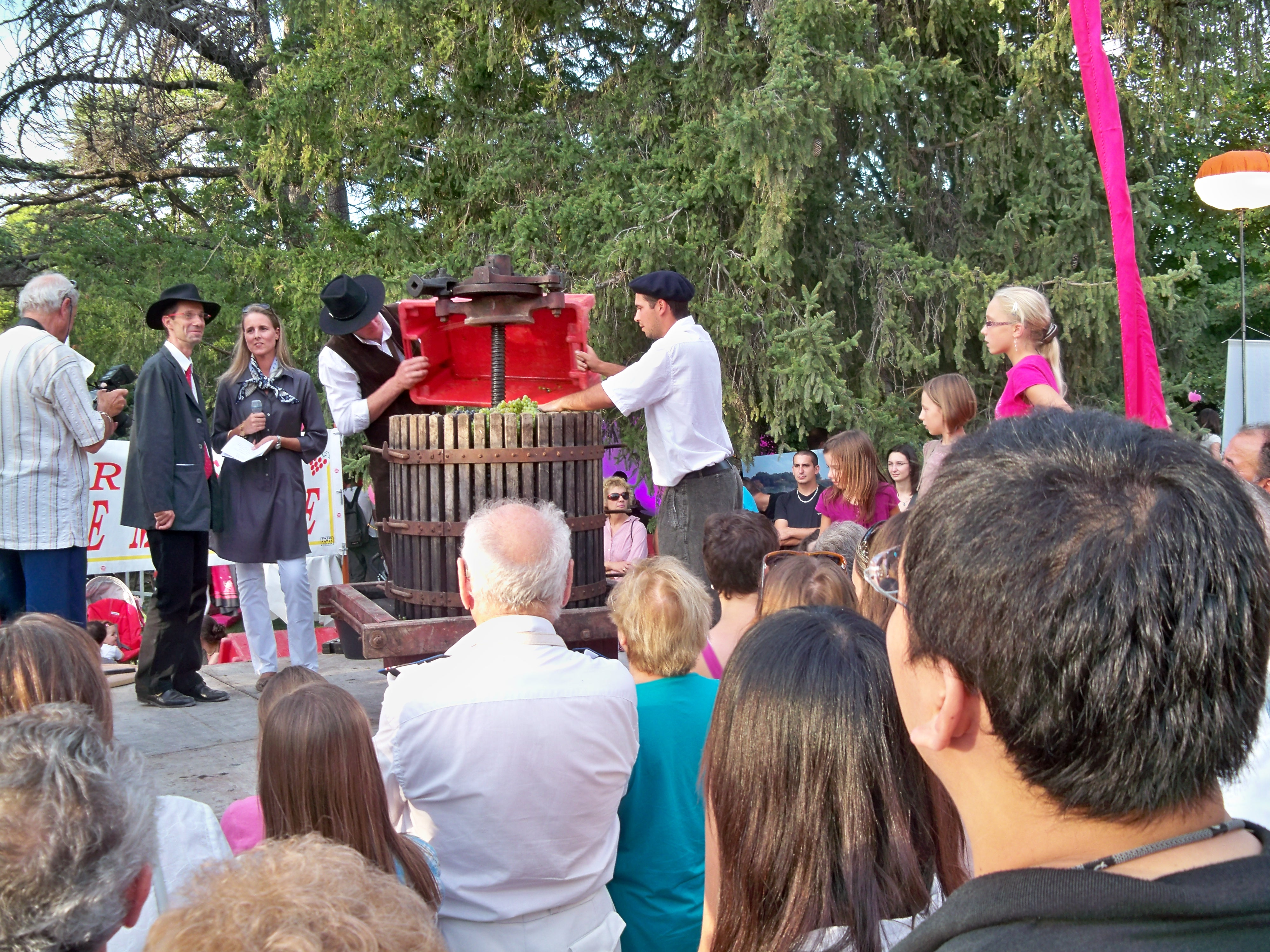 Première pression de raisin au Ban des Vendanges d'Avignon, Vaucluse, France